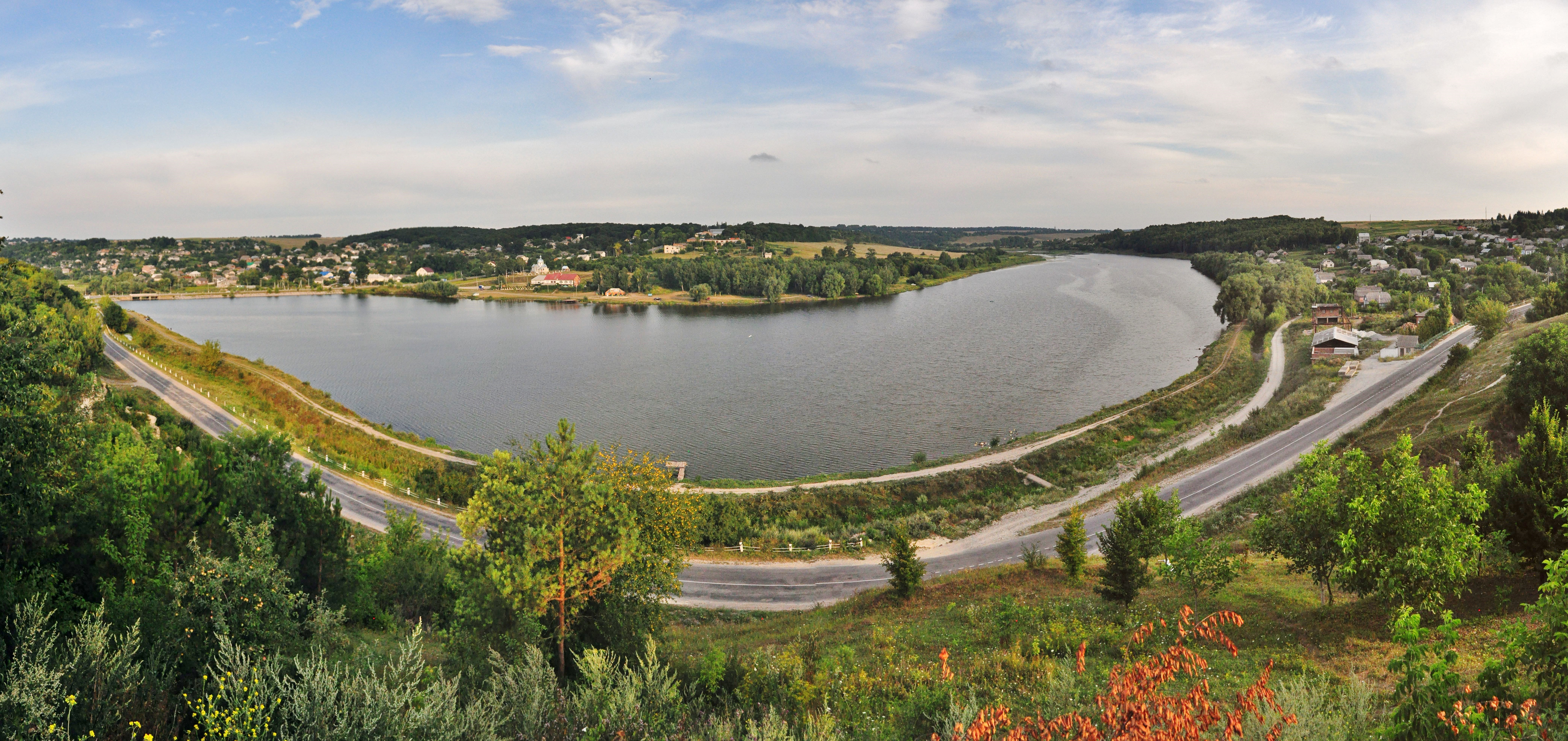 Водосховище на р.Смотрич у м. Городку Хмельницької обл.